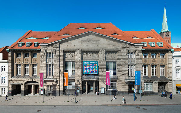 Theater Lübeck, Fassade